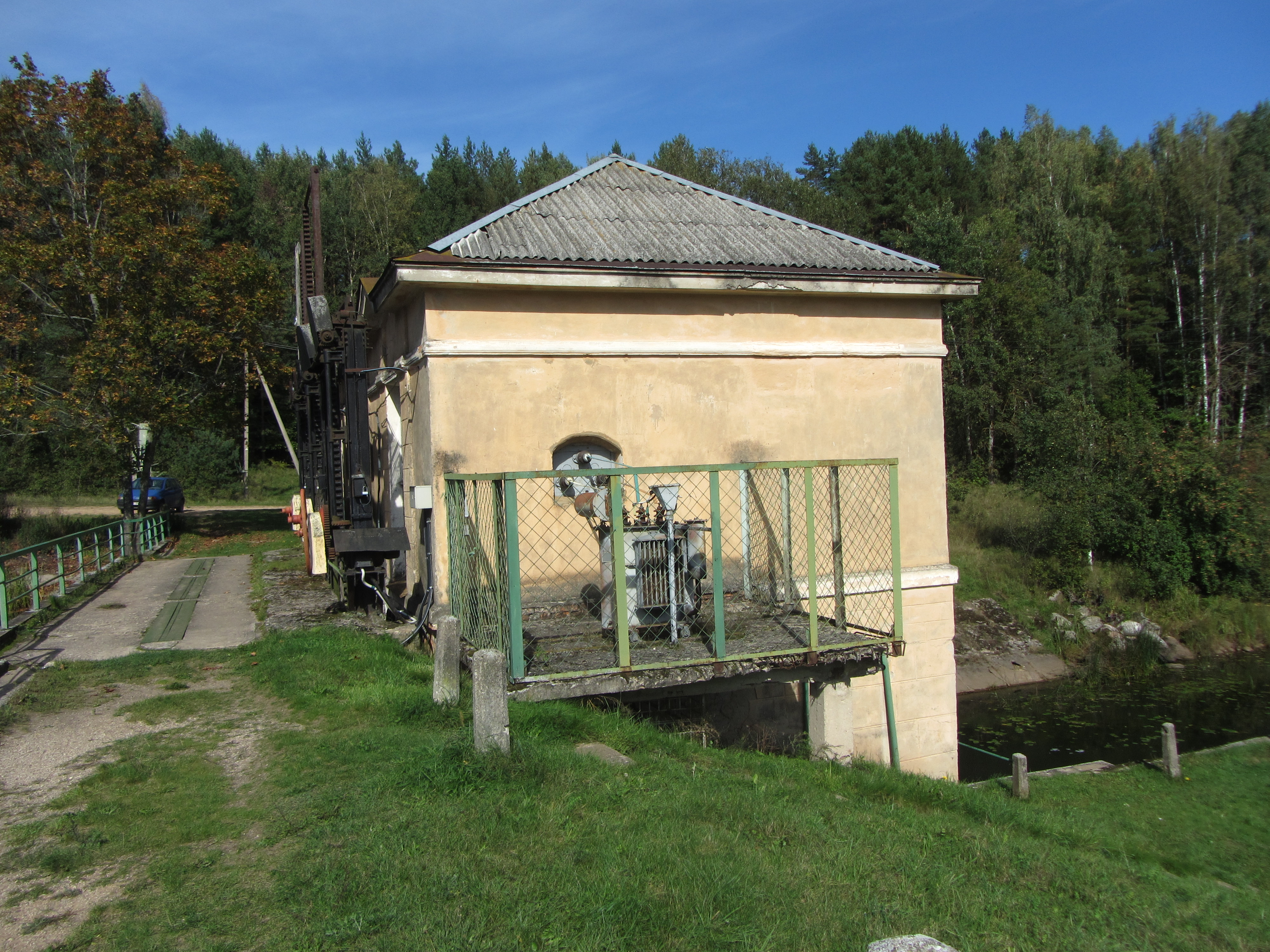 Naujojo Daugėliškio sen., Lithuania